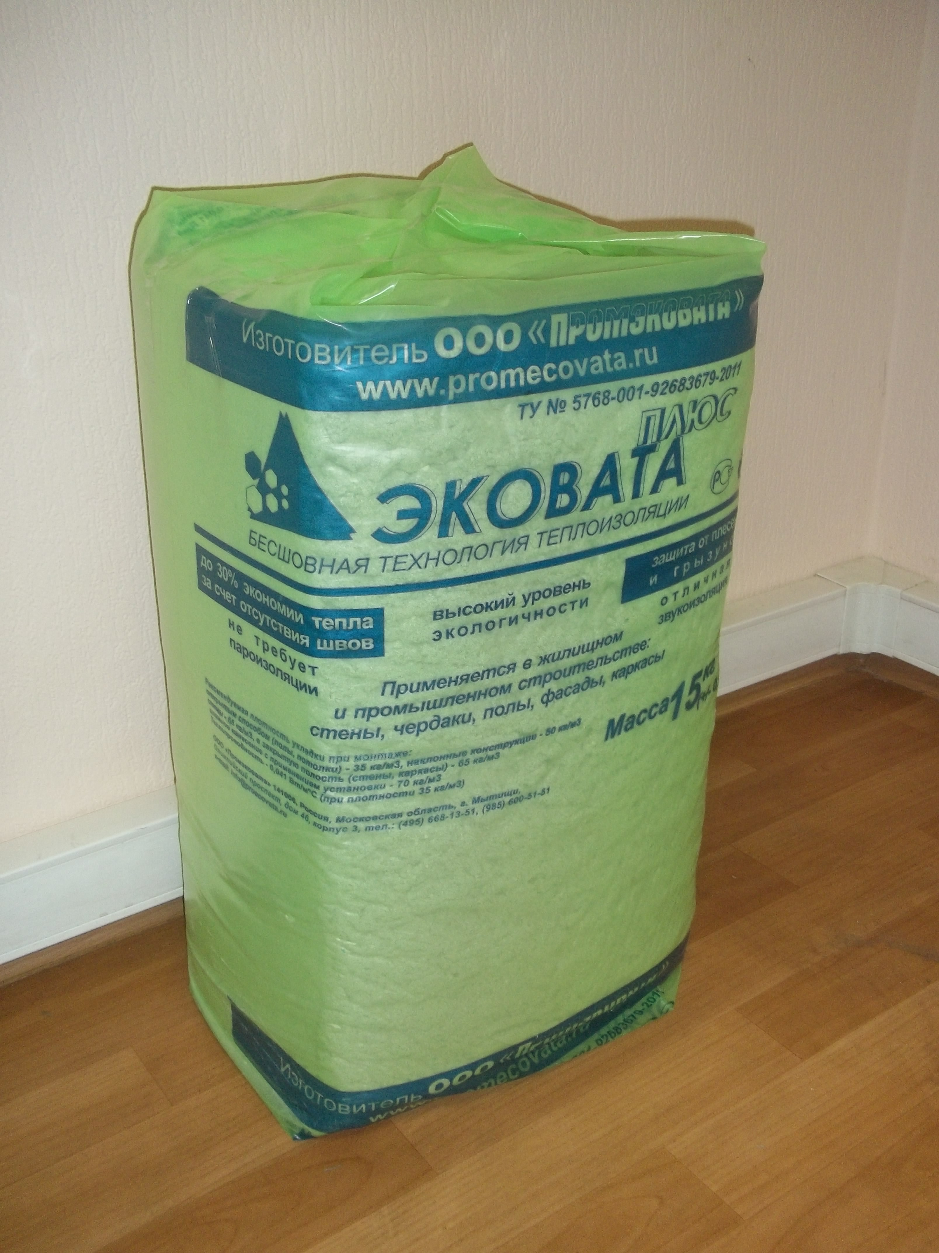 Эковата Плюс. Выпускается московской компанией ООО "Промэковата"